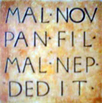 Une inscription sur le pavement de la Bibliothèque Malatestiana, Césène.